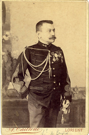 Commandant Léon de Beylié (1849-1910) en poste à Lorient en 1889.